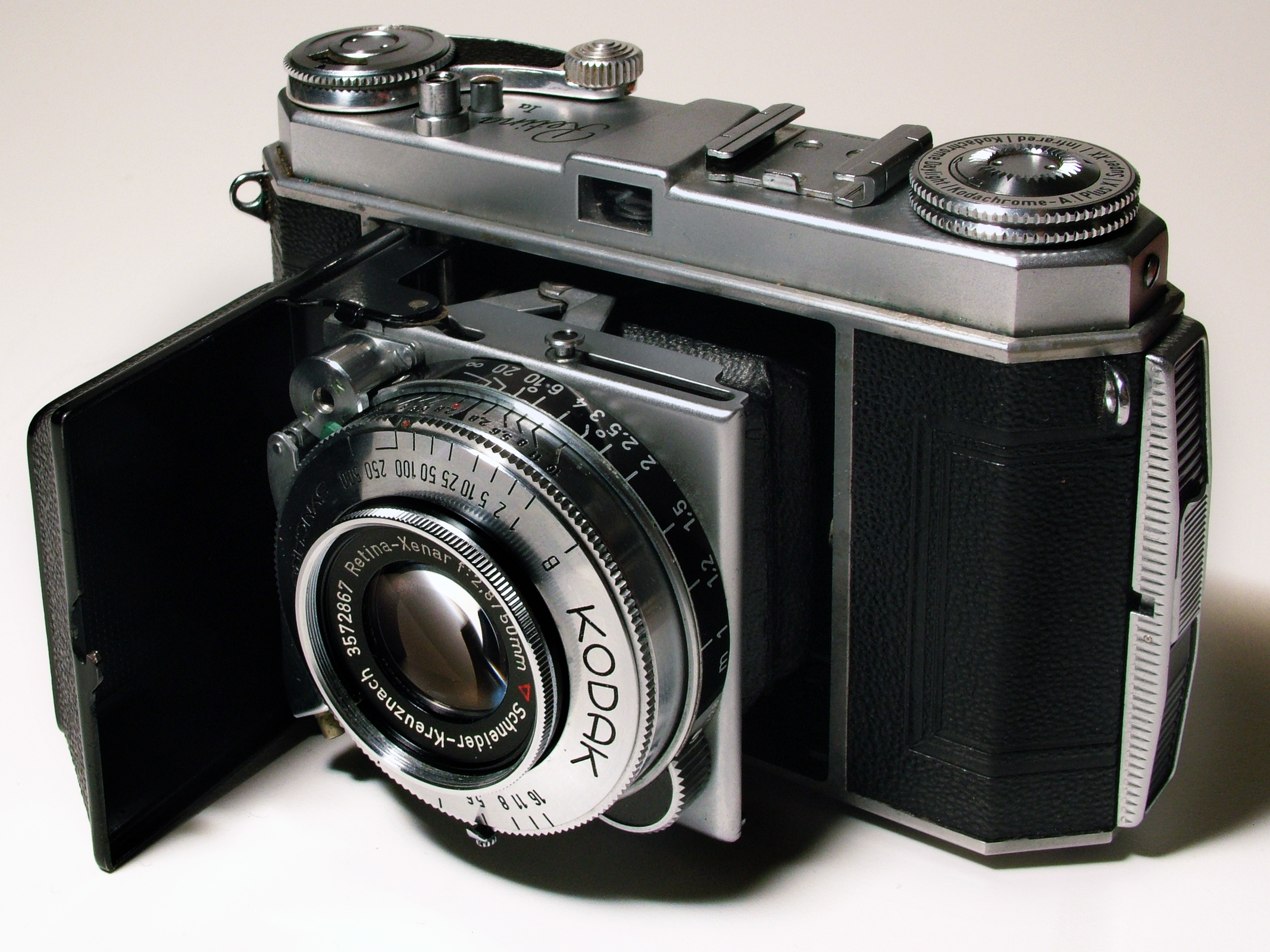 Kodak Retina Ia 35mm Schneider-Kreuznach Xenar 50/2.8